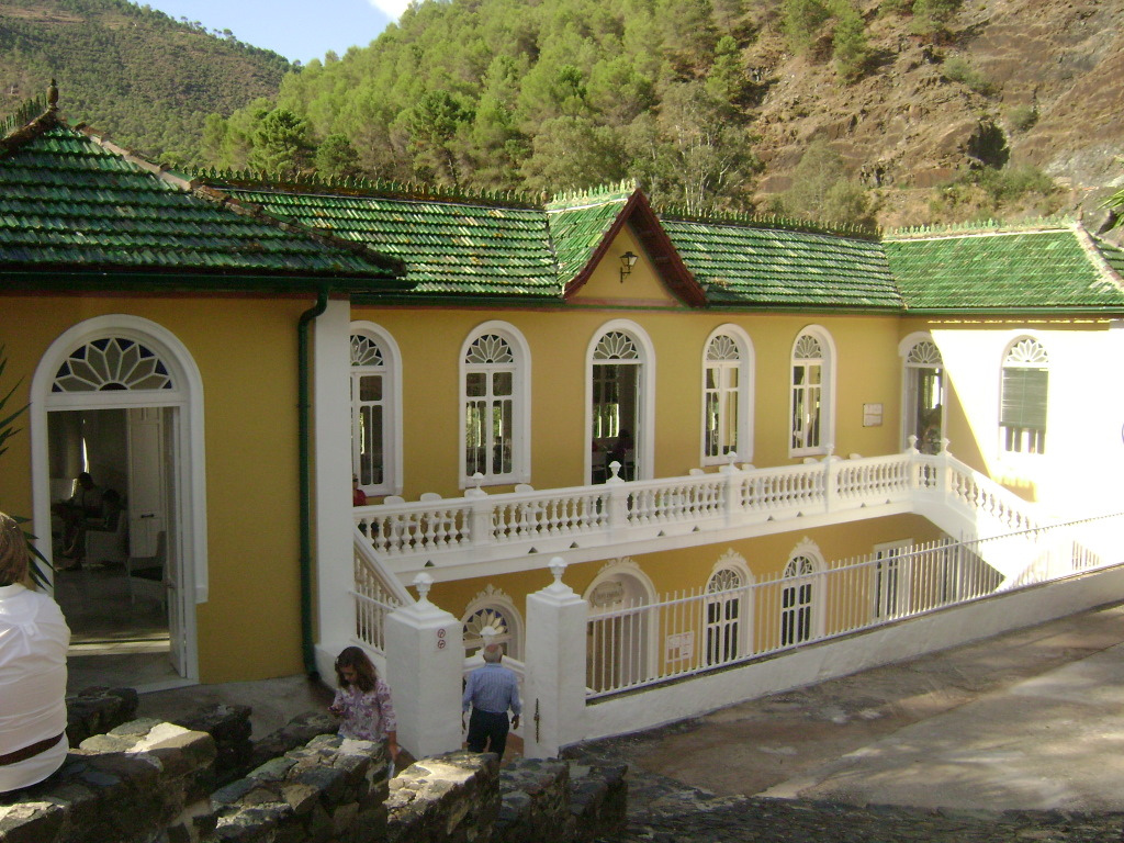 001. Balneario de Tolox